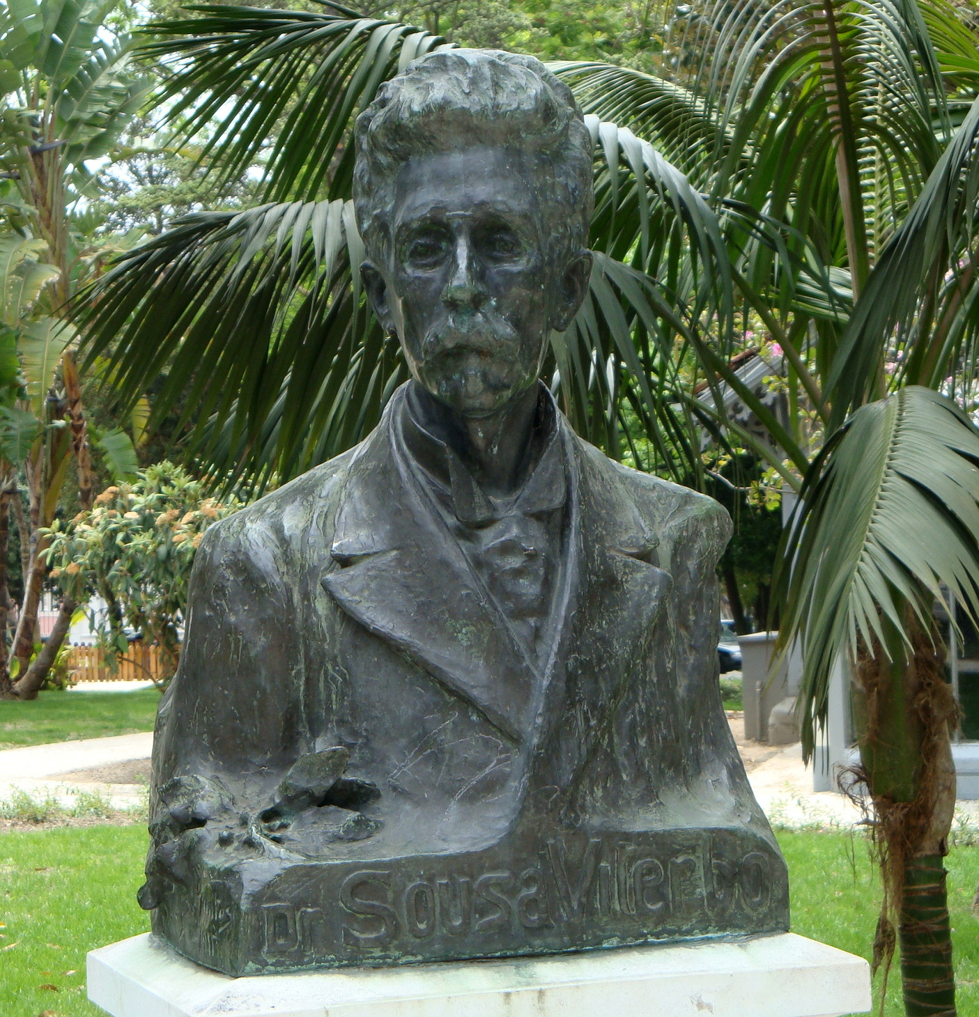 Busto do escritor português Sousa Viterbo